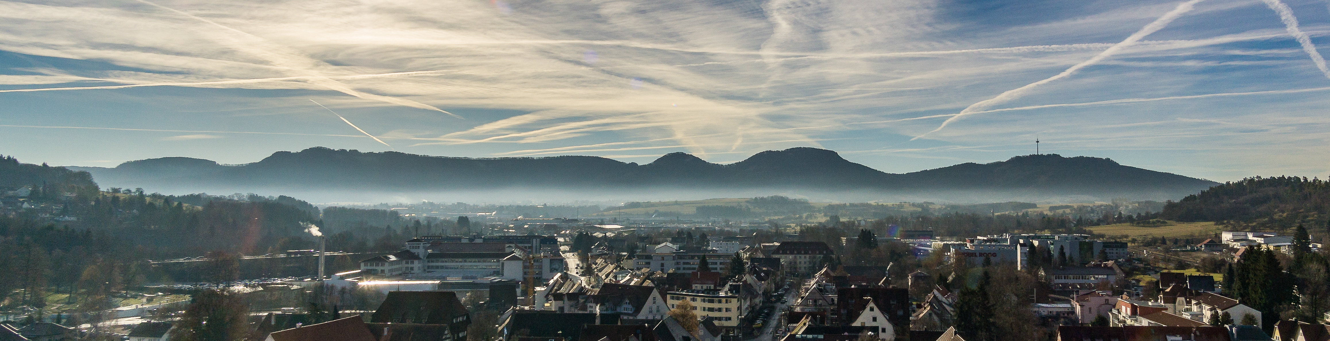 Stadtkirche Balingen - Blick vom Turm - Panoramablick nach Süden mit den Balinger Bergen: Gräbelesberg, Lochenhörnle, Lochenstein, Schafberg und Plettenberg